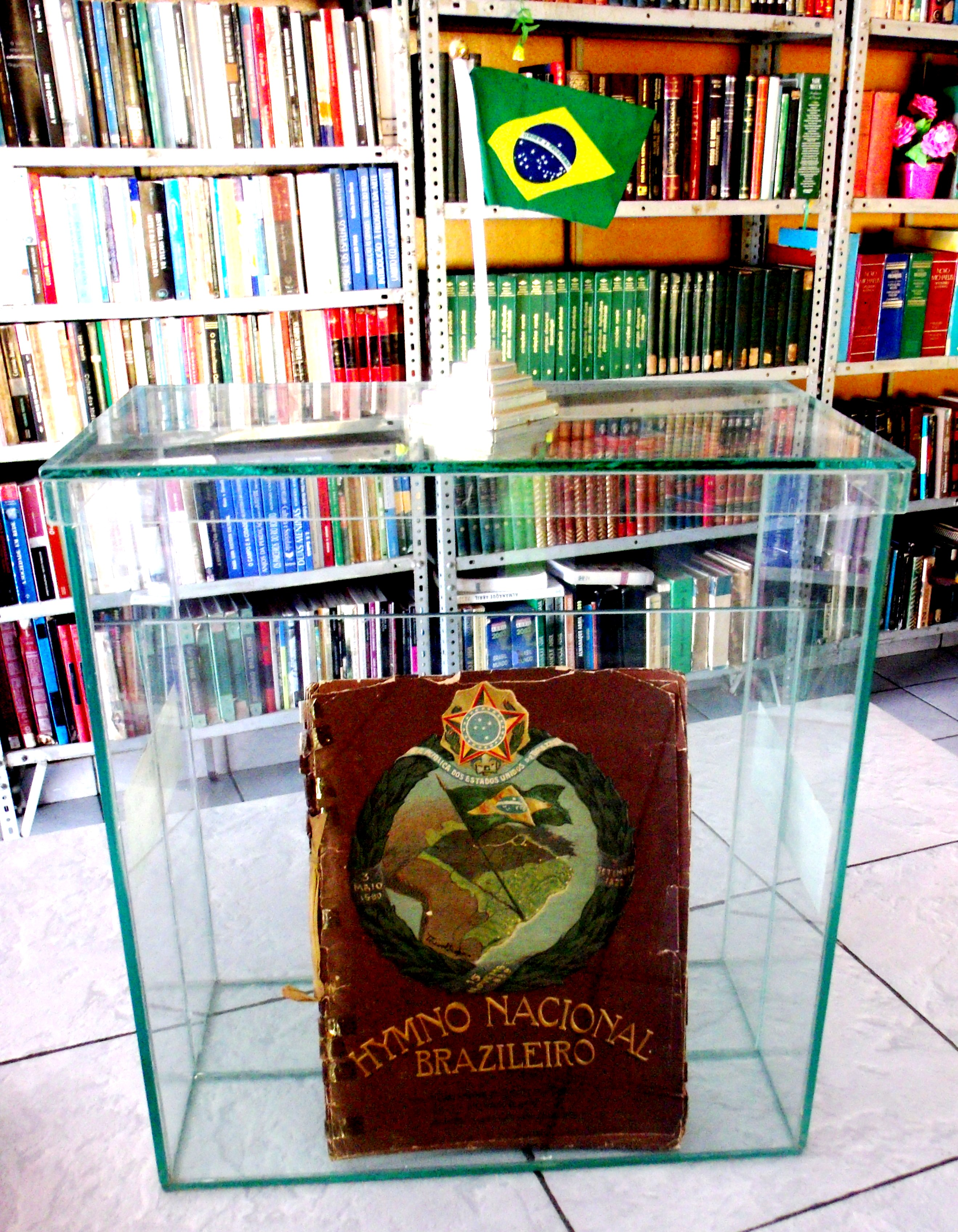 Homenagem de Teodoro Braga ao primeiro centenário da Independência do Brasil em 1922